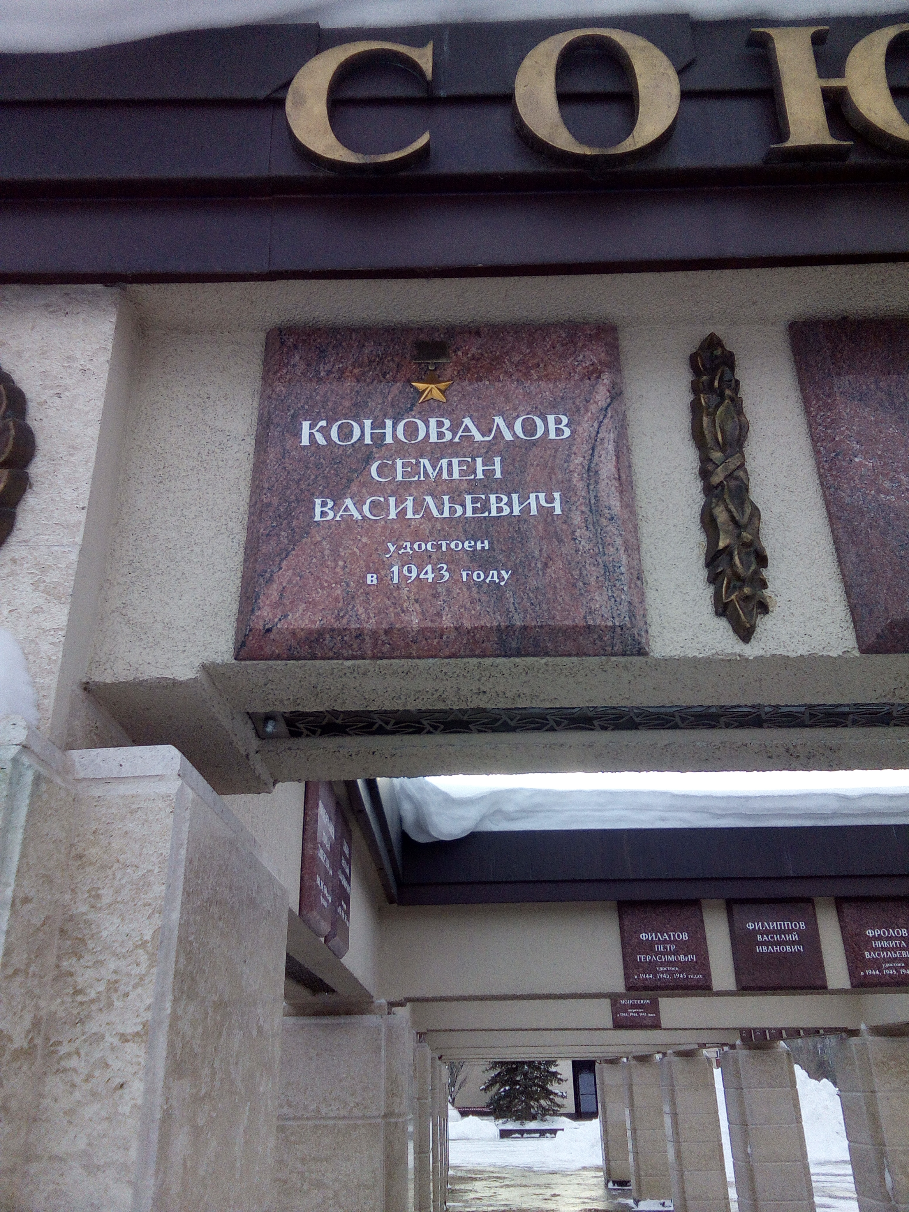 Табличка Коновалова Семена Васильева на Пантеоне Героев Парка Победы в г.Казани